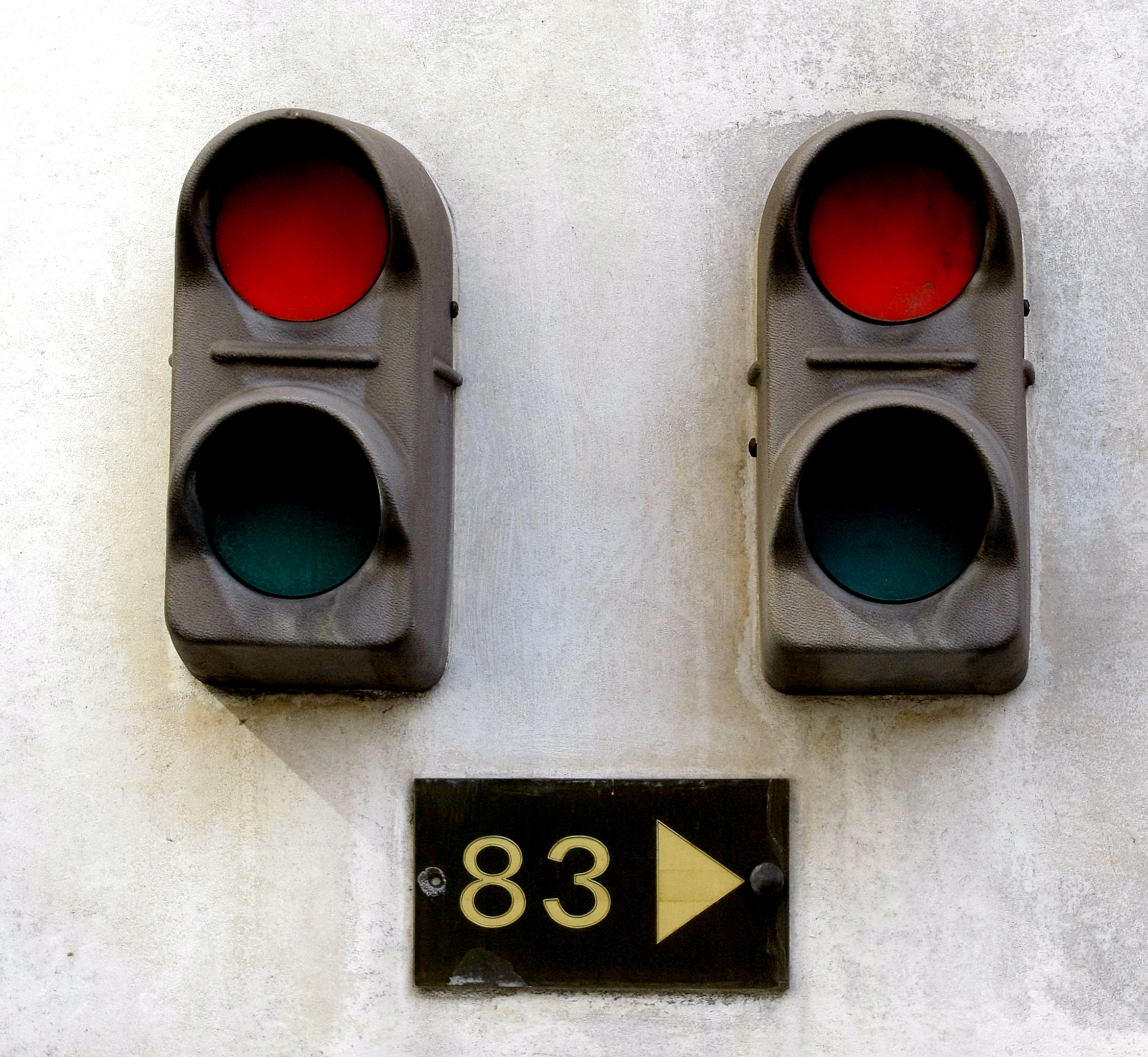 Avenue du Maine